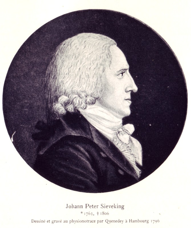 Johann Peter Sieveking, Dessiné et gravé par Quenedey à Hambourg 1796